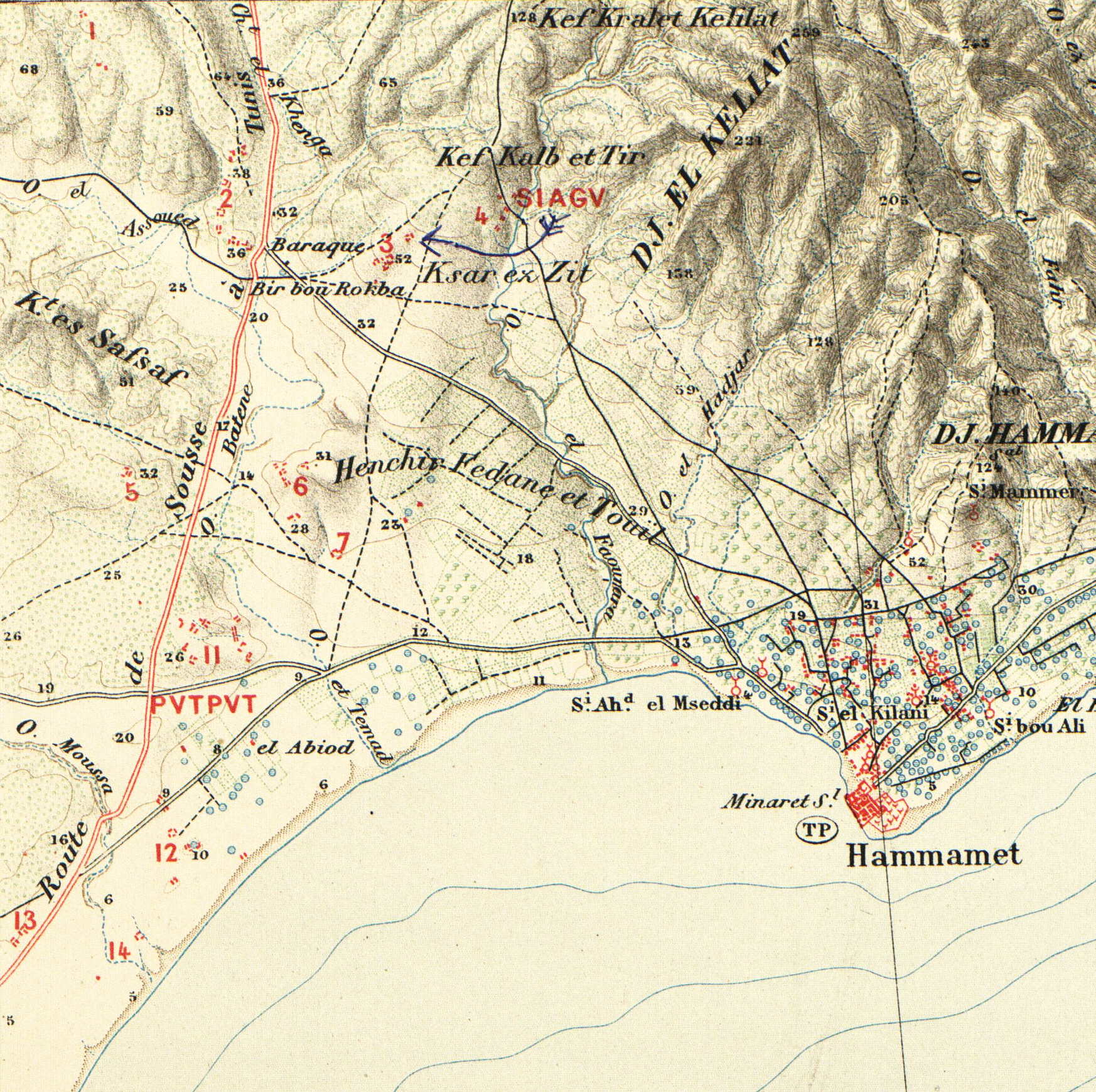 Extrait de lAtlas archéologique de la Tunisie au 1/50 000, feuille 39 [XXXVII] (1892). Zone de Pupput (n° 11-12 et 14), Siagu (n° 3) et Hammamet